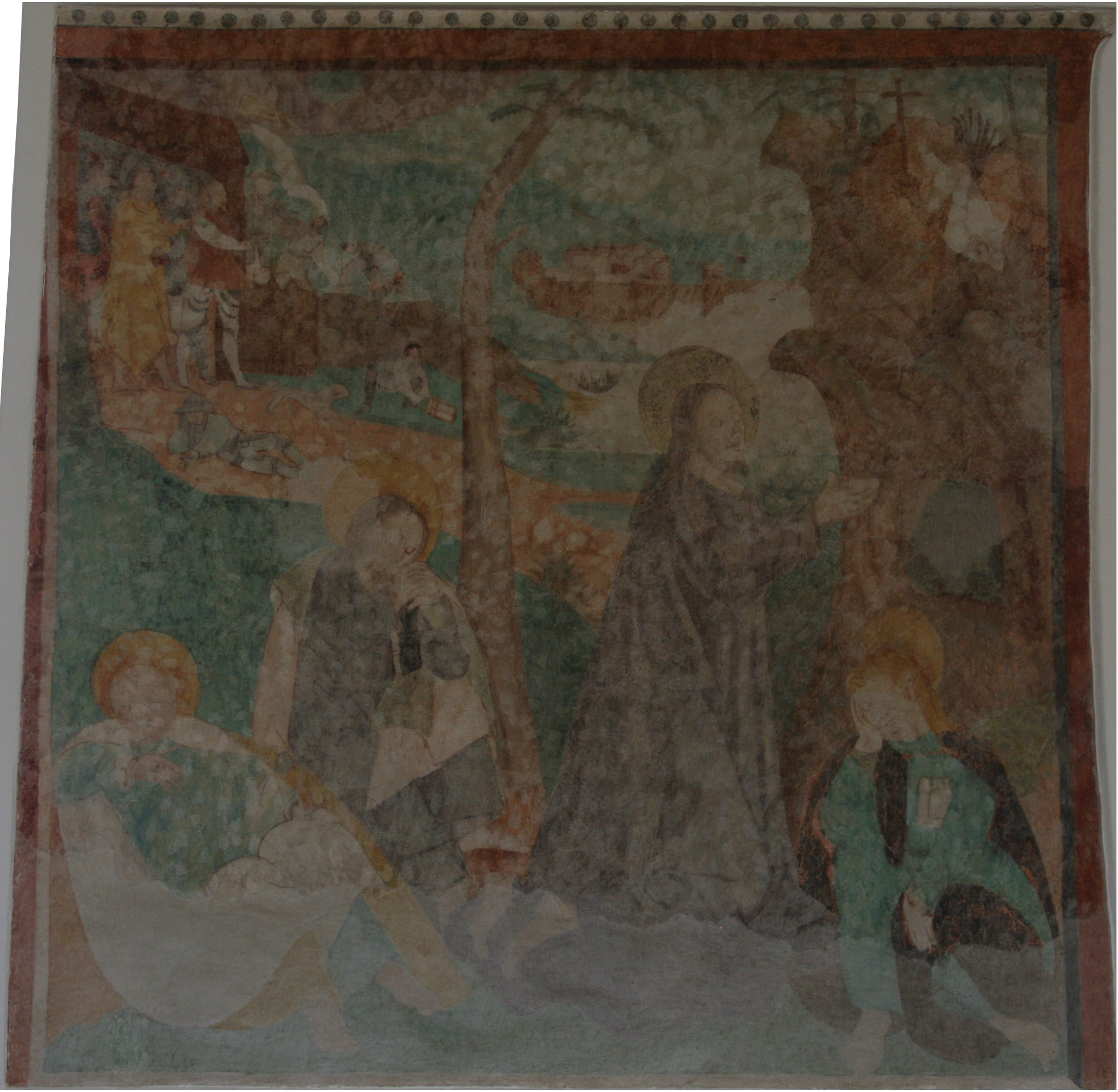 Fresko in der Kirche Mandach: Jesus im Garten Gethsemane mit den schlafenden Jüngern und den in den Garten kommenden Tempelsoldaten mit Judas